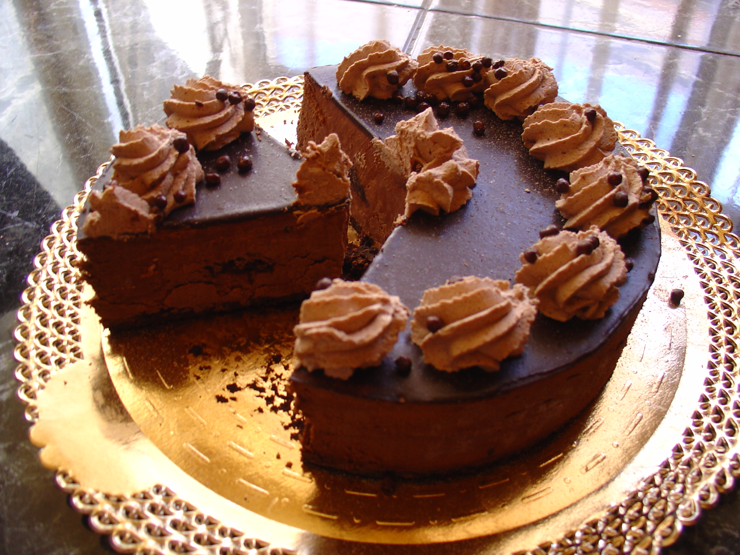 Tarta de chocolate